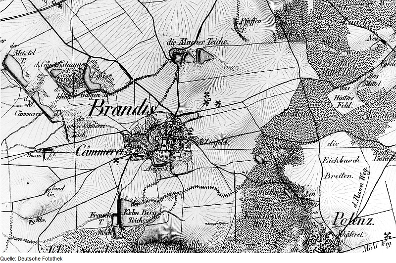 Original image description from the Deutsche Fotothek Brandis. Oberreit, Sect. Leipzig, 1836/39